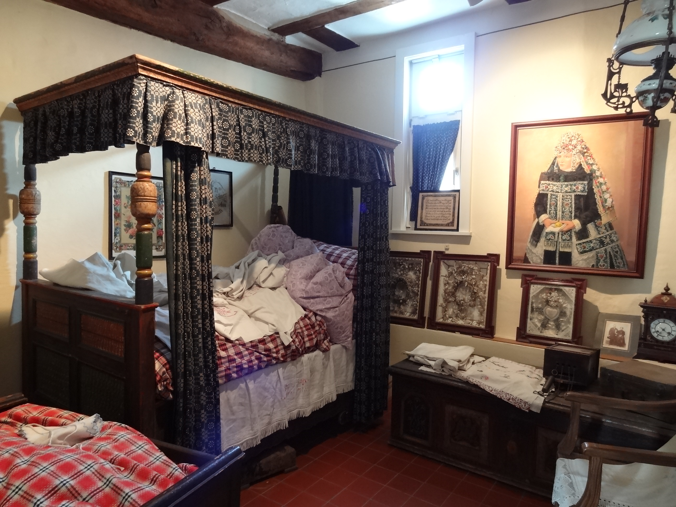 Hüttenberger Heimatmuseum, Schlafzimmer